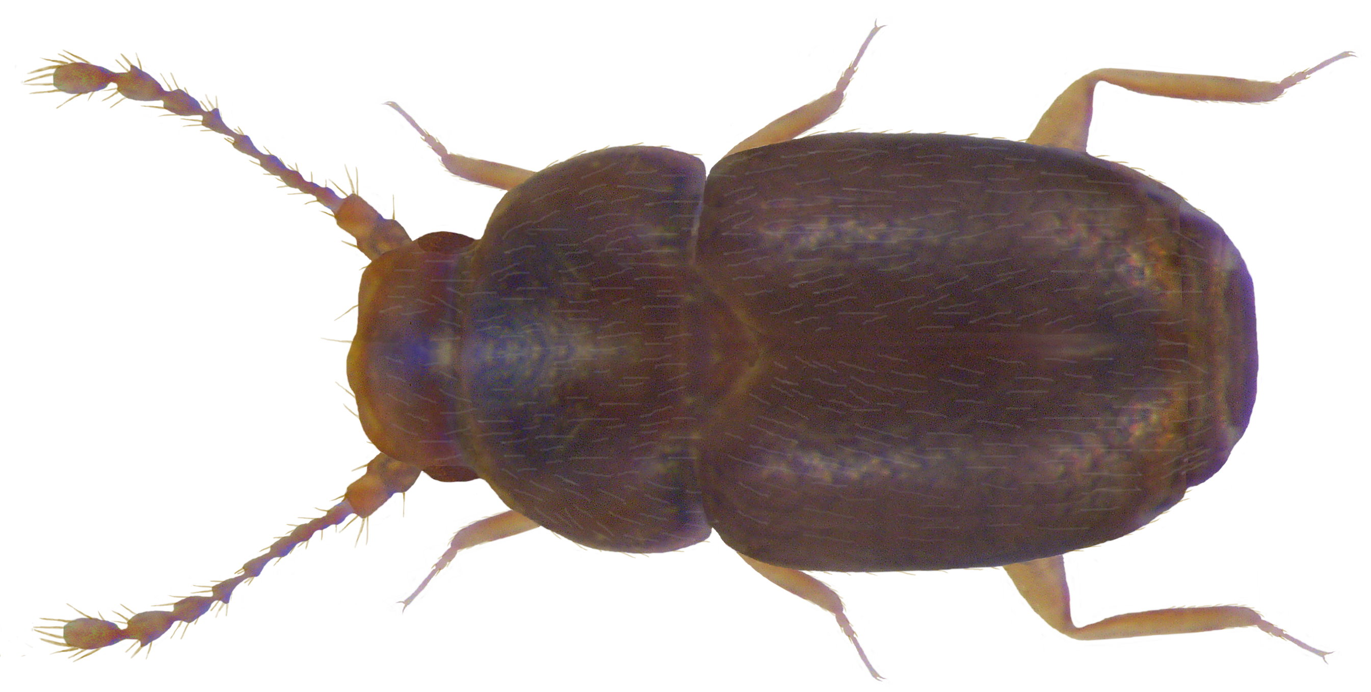 Familie: Ptiliidae Grösse: 0,75-0,85 mm Verbreitung: Europa Ökologie: an faulem Holz und unter Rinde Fundort: Germania, Bayern, Oberfranken, Untertiefengrün, Saaletal leg. A.Skale, 2003; det. U.Schmidt, 2005 Foto: U.Schmidt, 2009